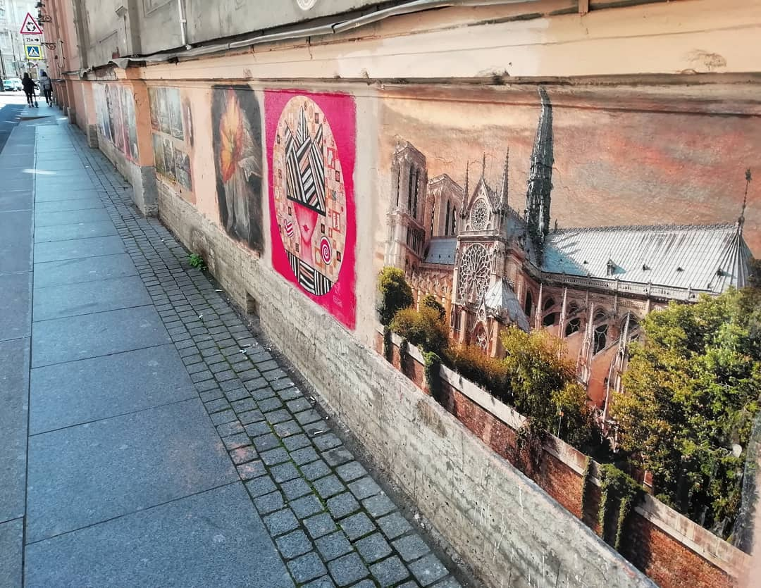 Урбанфреска изображение Собора Парижской Богоматери